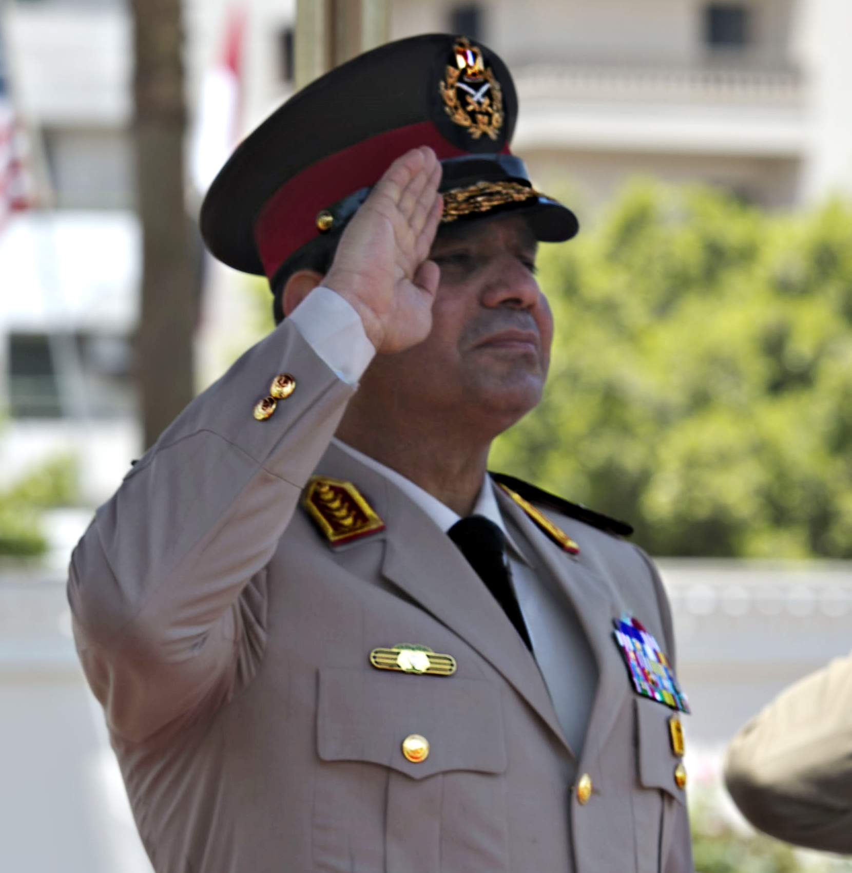 عبد الفتاح السيسي، وزير الدفاع المصري الأسبق.